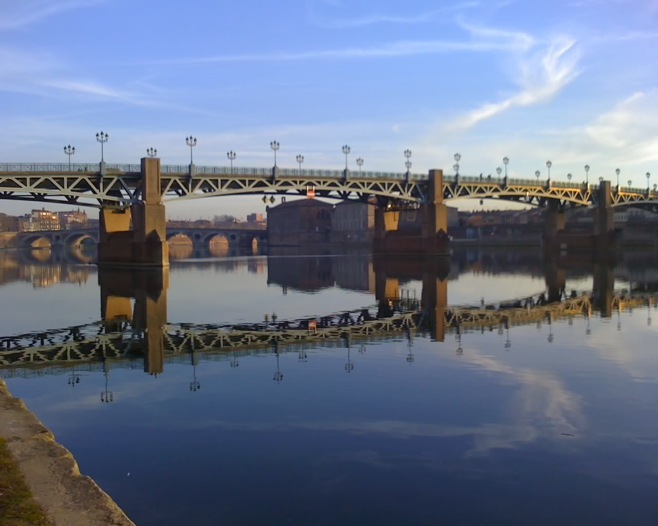 Pont Saint-Pierre à Toulouse